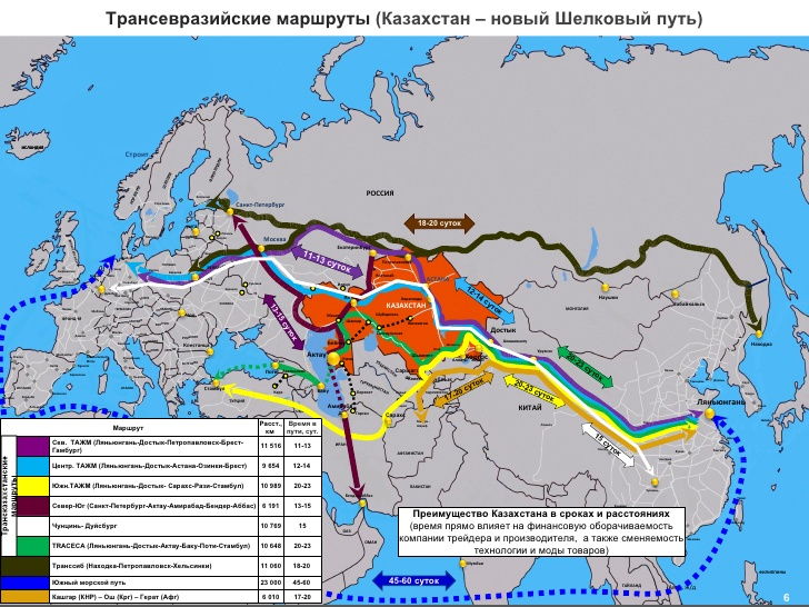 Планируемые и существующие транспортные маршруты с Китая